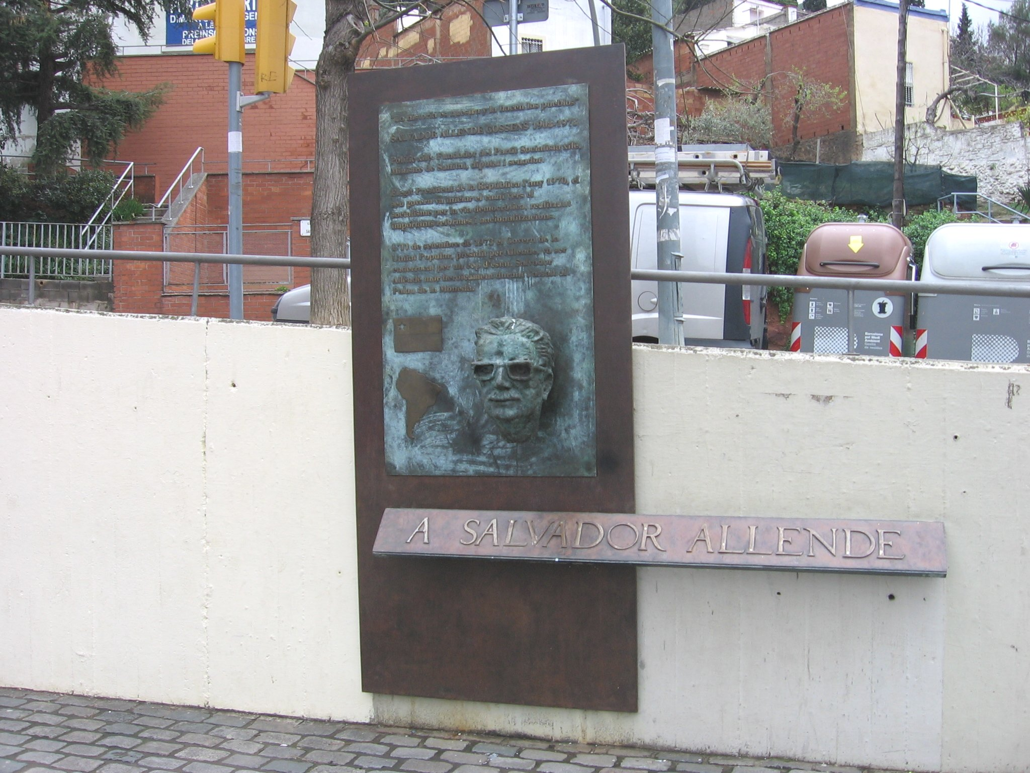 Monumento a Salvador Allende, barrio del Carmelo, distrito de Horta-Guinardó (Barcelona).